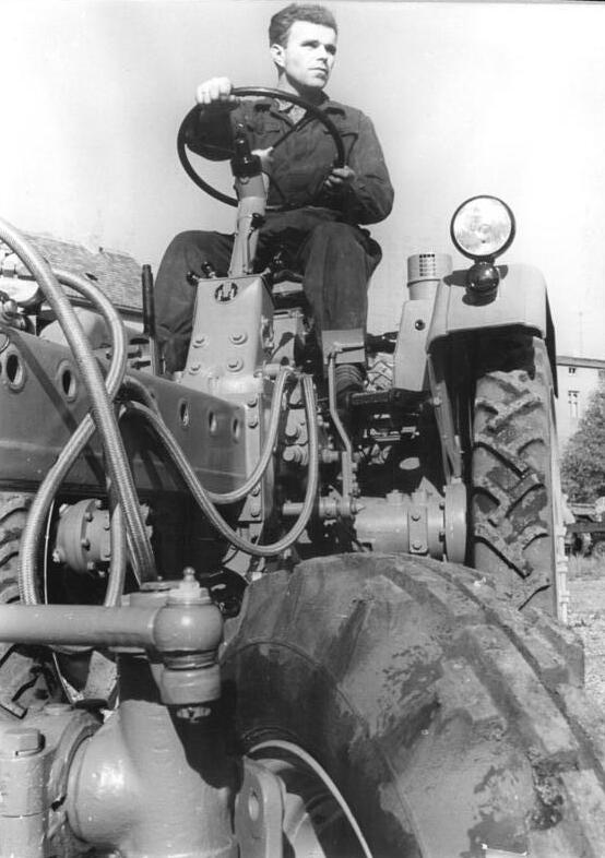 Traktorist auf einem Schlepper "Maulwurf" Zentralbild Biscan Weiß-Ho. 1.10.1957 Der neue "Maulwurf" mit Dieselmotor Der Geräteträger "Maulwurf", der sich schon seit Jahren im In- und Ausland auf das beste bewährt, hat einen Nachfolger bekommen: Den neuen "Maulwurf", der die Typenbezeichnung RS 09 trägt, mit Dieselmotor ausgestattet ist und seinen vorgänger in vielen Beziehungen weit übertrifft. Nach jahrelanger Entwicklungsarbeit ist nun im volkseigenen Traktorenwerk Schönebeck, die Serienproduktion des neuen Geräteträgers angelaufen. Die ersten Maschinen sind schon ausgliefert worde; noch in diesem Jahre geben die ersten Exportlieferungen nach Ungarn und in die Tschechoslowakei.- Der neue "Maulwurf" ist mit dem österreichischen Zweizylinder-Dieselmotor "Warchalowski" ausgestattet, der 18 PS leistet und luftgekühlt ist. Der Geräteträger hat 8 Vorwärts- und 8 Rückwärtsgänge, Differntialsperre und zwei Zapfwellen, die unabhänging von einander in Fahrt und Stand, links- oder rechtsdrehend, motor- oder weggebunden benützt werden können. Bodenfreiheit, Radstand und Spurweite können verstellt werden. Ausserdem ist der neue "Maulwurf" ein sog. Zweiwegefahrzeug: durch Umstecken der Sitzwanne und der Bedienungshebel kann er für dauernde Rückwärtsfahrt umgestellt werden. UBz: Der Traktorist - hier ist es Monteur Aktivist Erich Thielscher - bat von seinem Sitz aus einen guten Überblick über die Maschine und alle angebauten Geräte und kann sämtliche Bedienungsgriffe sitzend ausüben. Anstelle der bisherigen mechanischen Bestätigung ist eine moderne Hydraulik getreten.